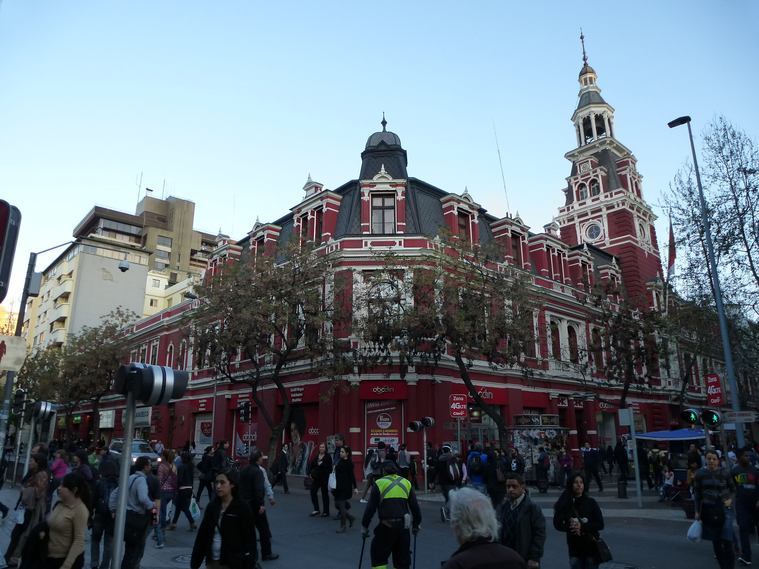 Cuartel General del Cuerpo de Bomberos de Santiago This is a photo of a national monument in Chile: 848